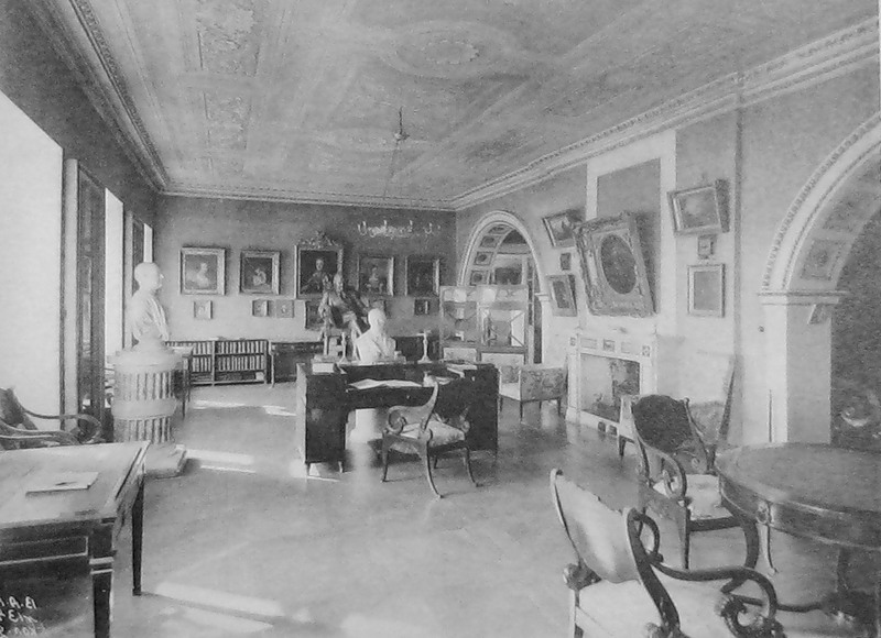 Обстановка кабинета Н. П. Мещерского, вторая половина XIX века.